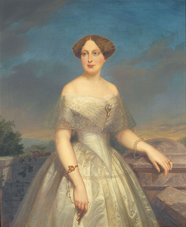 Drottning Lovisa som prinsessa